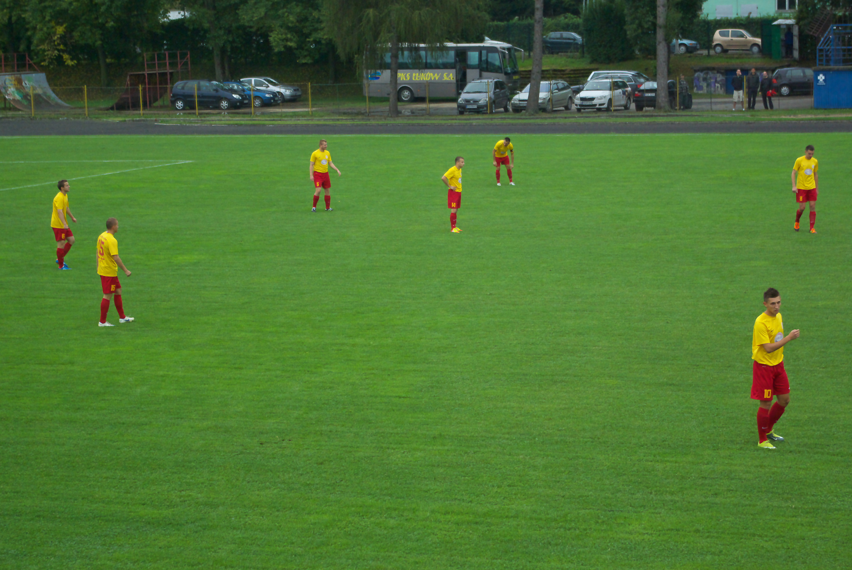 Stal Sanok - Orlęta Łuków 15.08.2012 piłkarze Orląt